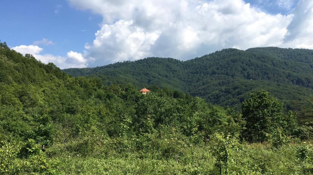 Srpski (latinica): Novkov Rid, zaselak Bukove Glave